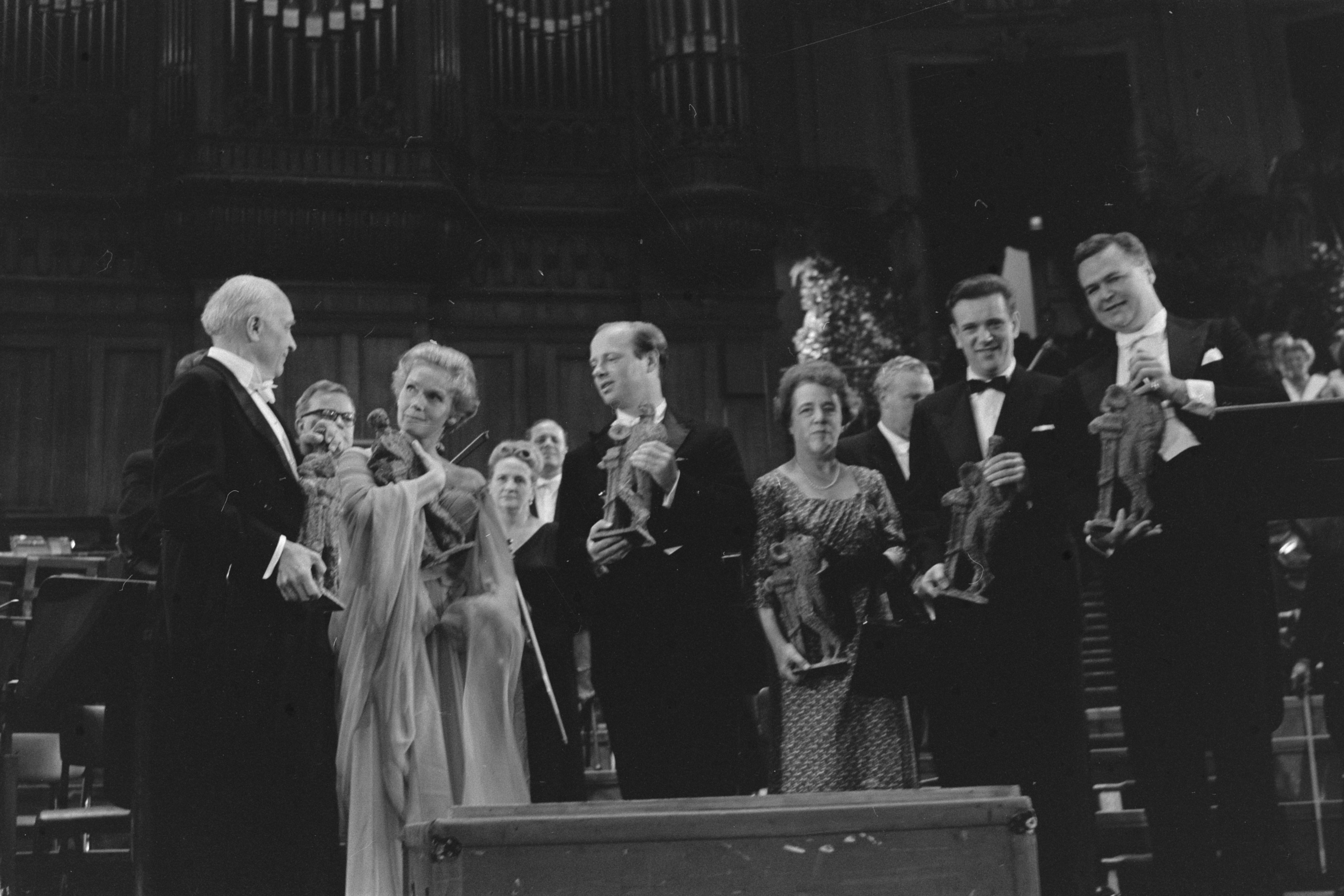 Collectie / Archief : Fotocollectie Anefo Reportage / Serie : [ onbekend ] Beschrijving : Uitreiking Edisons in Grand Gala Du Disque . De winnaars van de Edisons: Casadesus, Schwarzkopf, Haitink, mejuffrouw Schil (namens het Amadeus Quartet), Jack Boyce en Thurston Dart / Datum : 29 september 1961 Trefwoorden : Uitreikingen, Winnaars Persoonsnaam : Dart, Haitink Fotograaf : Pot, Harry / Anefo Auteursrechthebbende : Nationaal Archief Materiaalsoort : Negatief (zwart/wit) Nummer archiefinventaris : bekijk toegang 2.24.01.05 Bestanddeelnummer : 912-9844